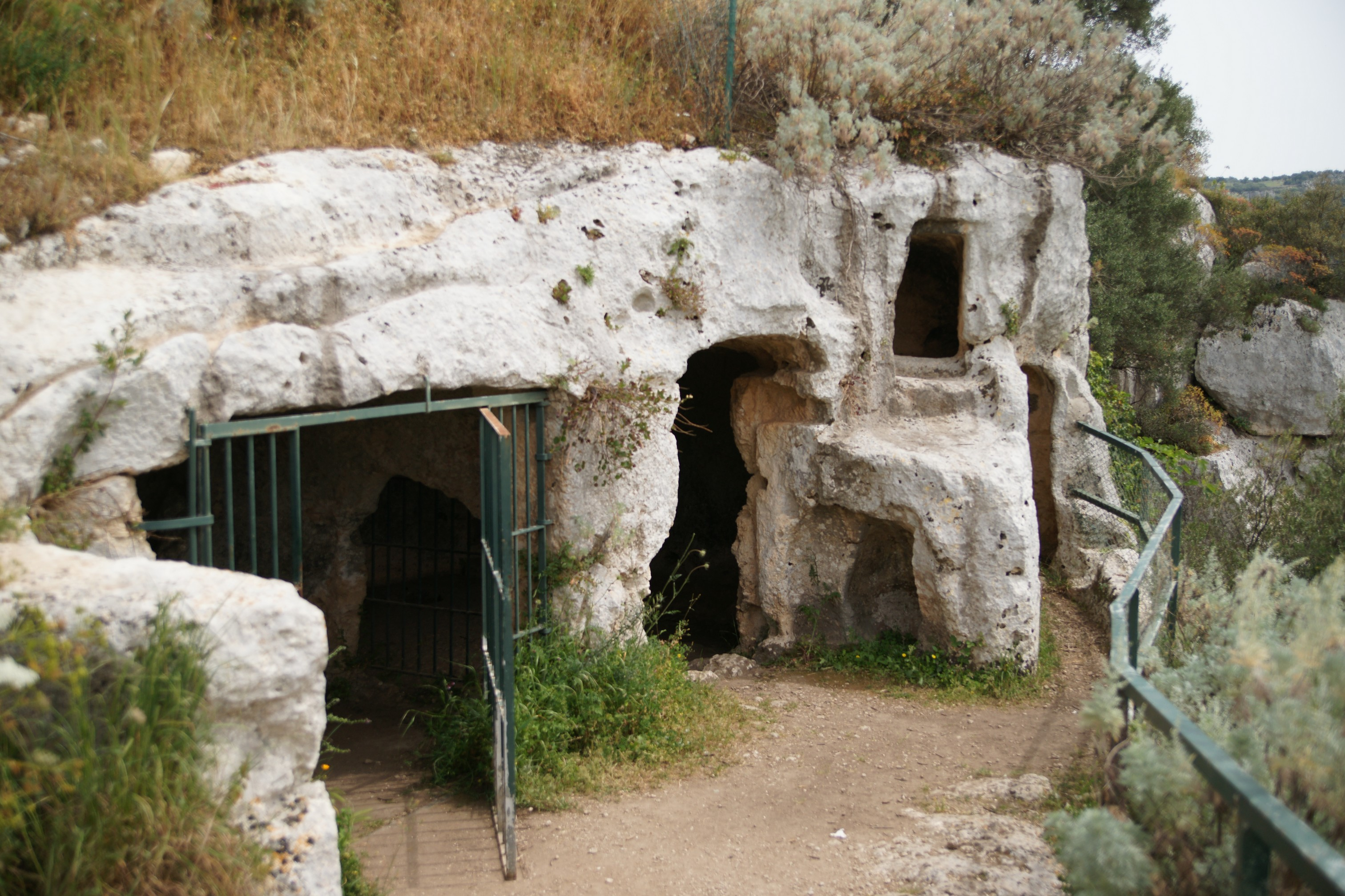 Pantalica: Chiesa San Miciadoro (byzant.)